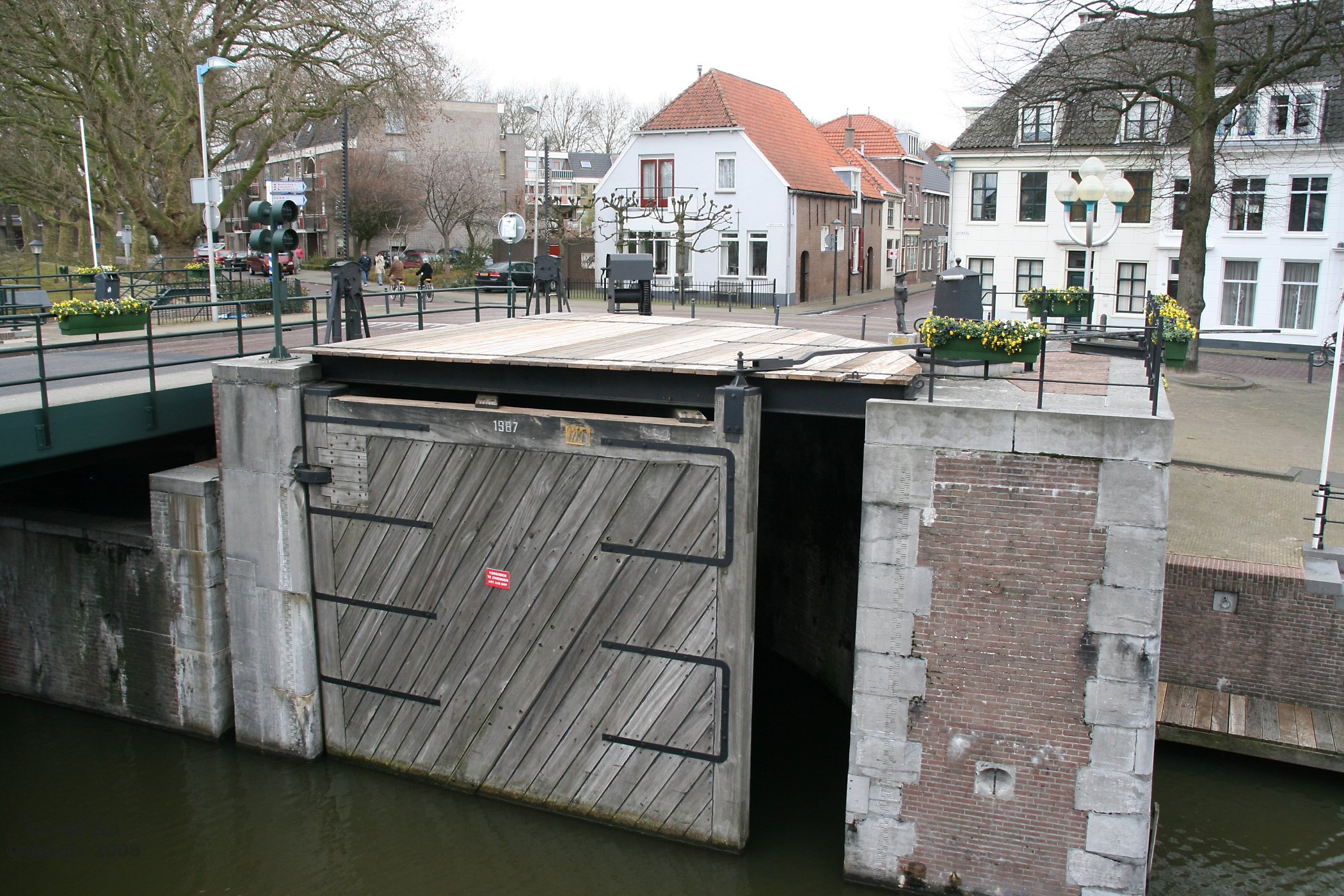 Gorinchem: deur van de Korenbrugsluis, een waaiersluis